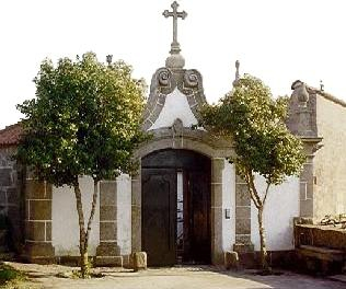 Casa da Igreja - Sobrosa - Paredes - Portugal